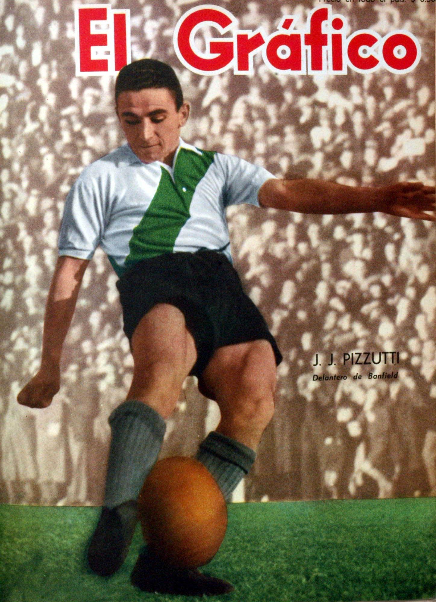 El Grafico del 22 de Julio de 1949. Edicion 1563